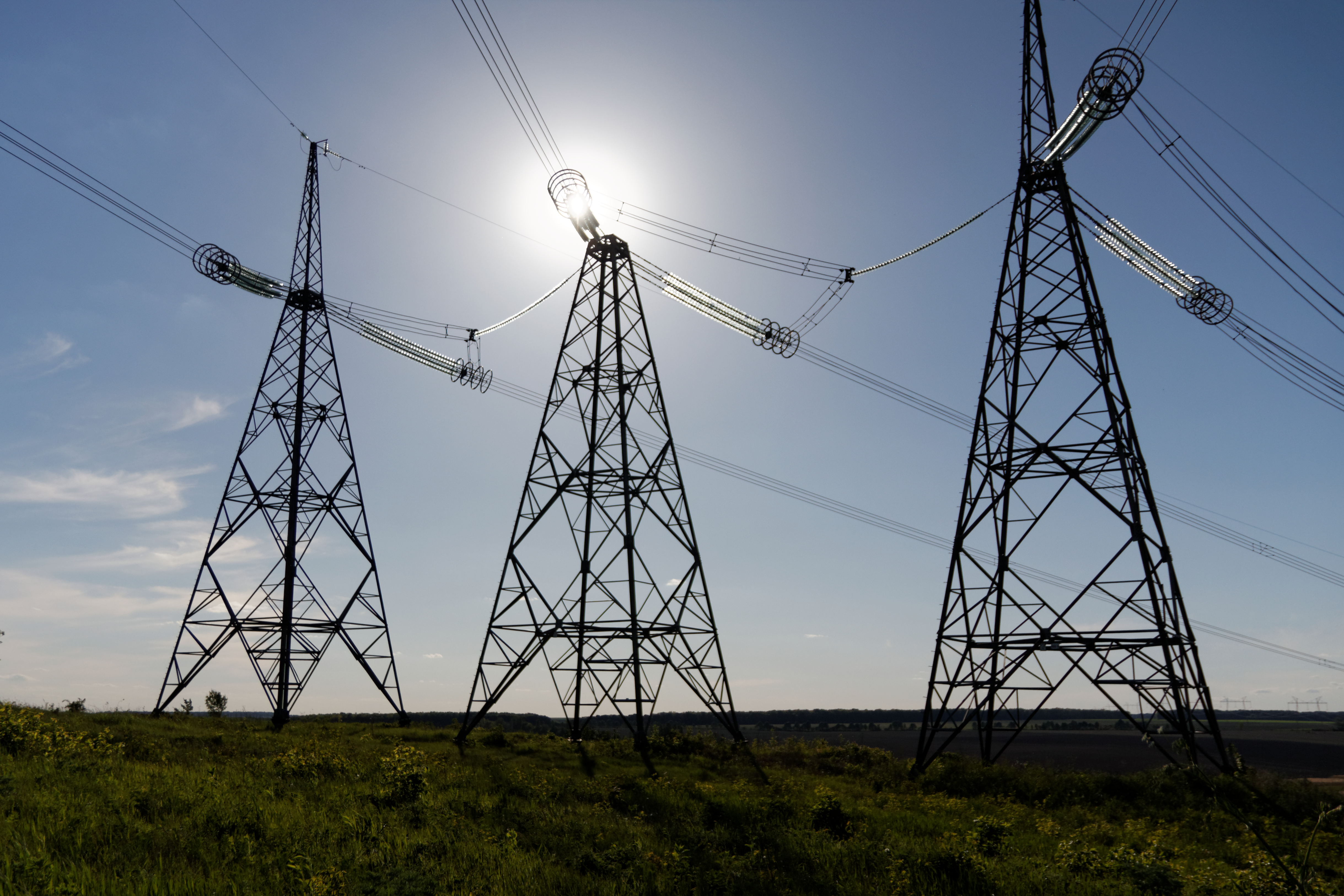 Анкерна опора ЛЕП 750кВ Южноукраїнська АЕС-В нниця 750